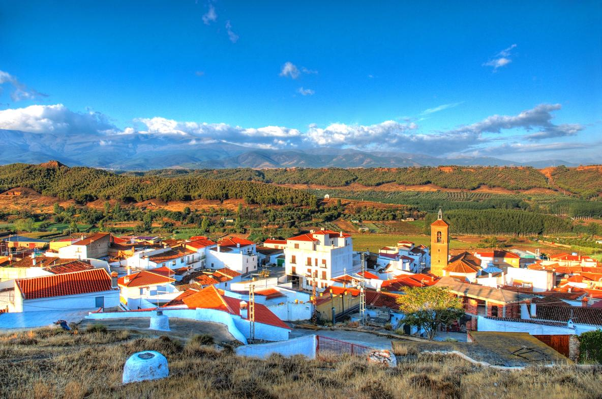 Alcudia de Guadix